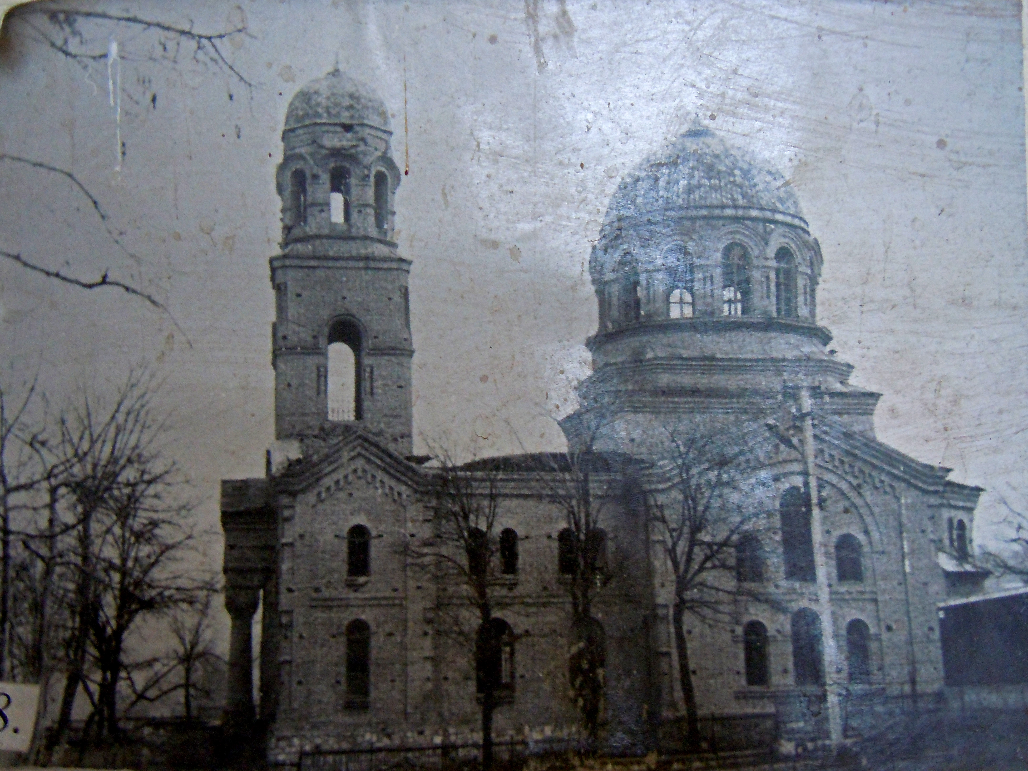 Церква, с. Криничне, Ювілейна вул.